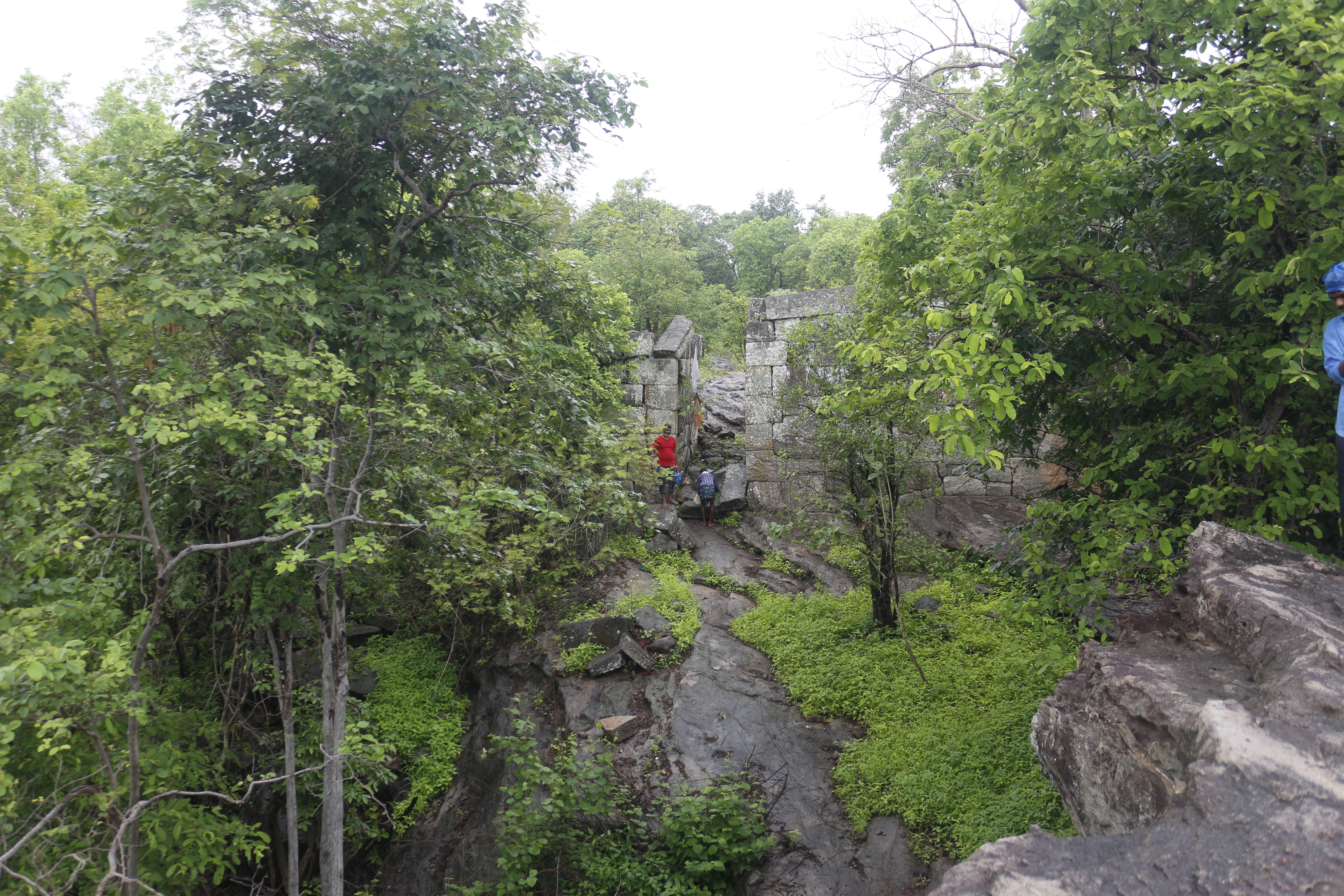 గొంతెమ్మ గుట్ట